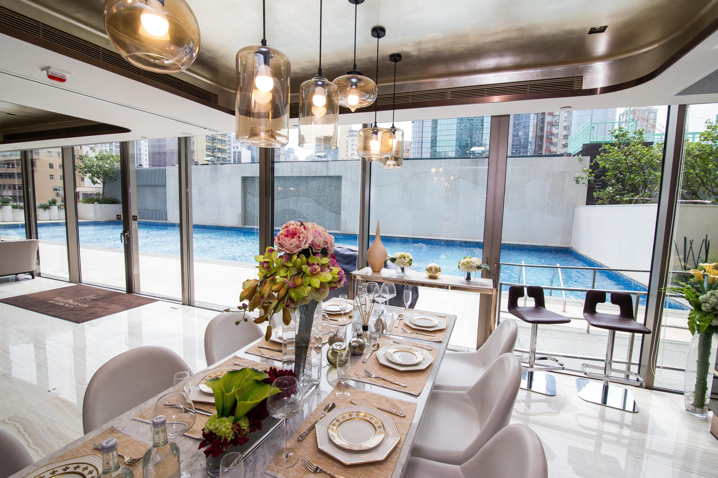 中文（香港）: 麥花臣匯住客會所